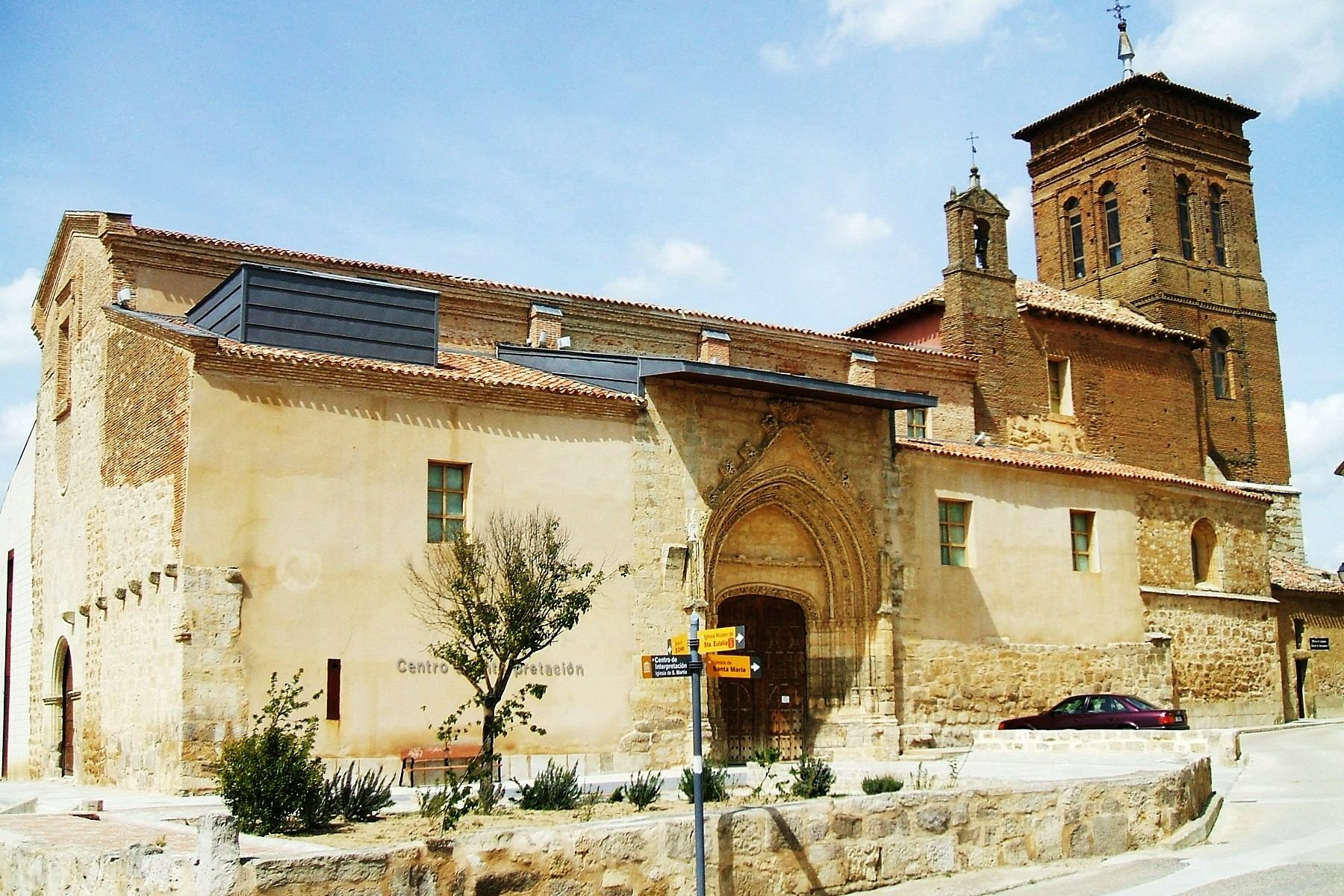 Antigua iglesia de San Martín, hoy habilitada como Centro de Interpretación de Tierra de Campos, en Paredes de Nava, Palencia, Castilla y León, España